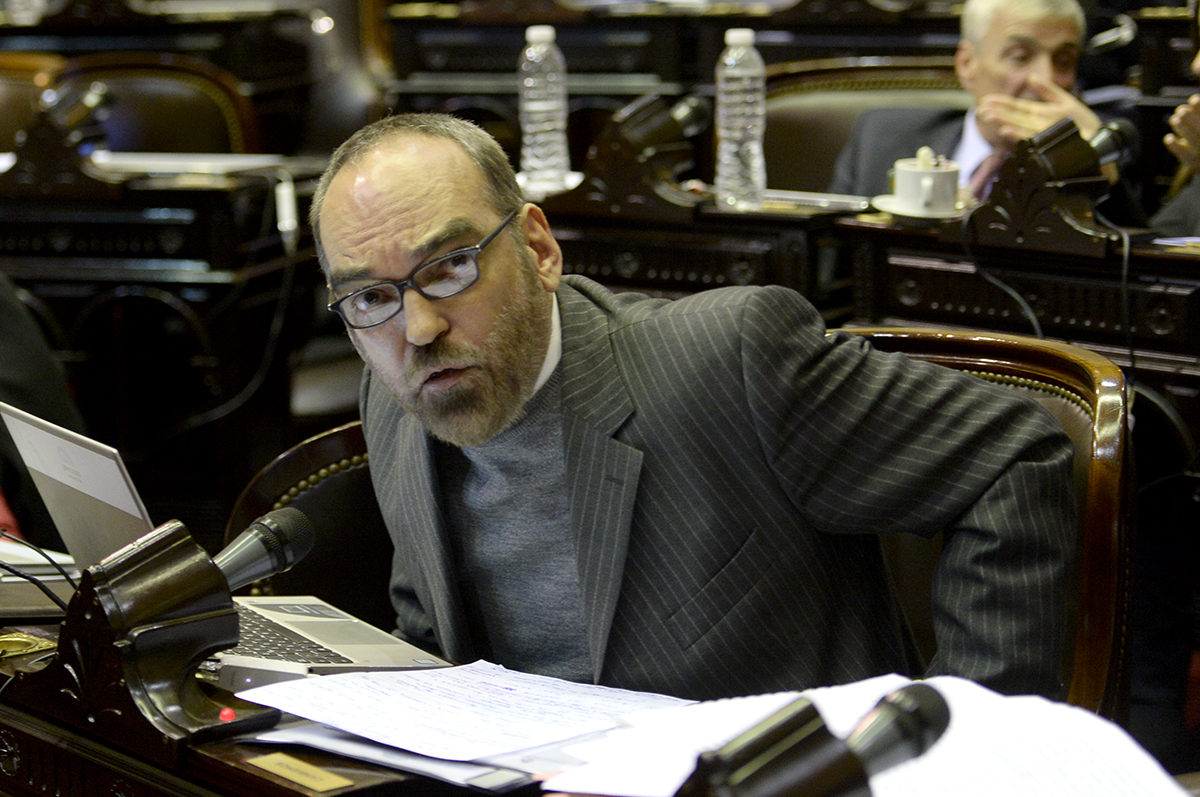 Sesión de la Cámara de Diputados Argentina por la despenalización del aborto. Diputado Fernando Adolfo Iglesias.